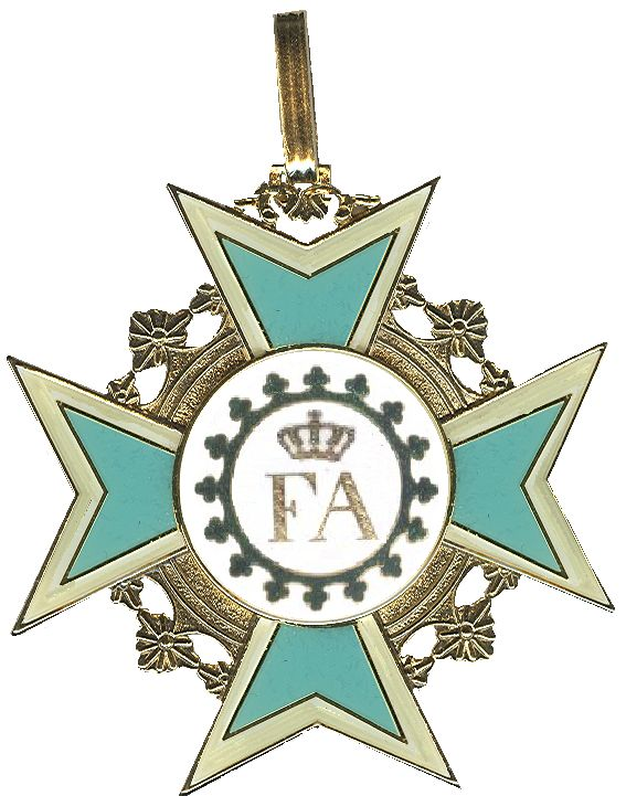 Scan van een kruis in mijn verzameling